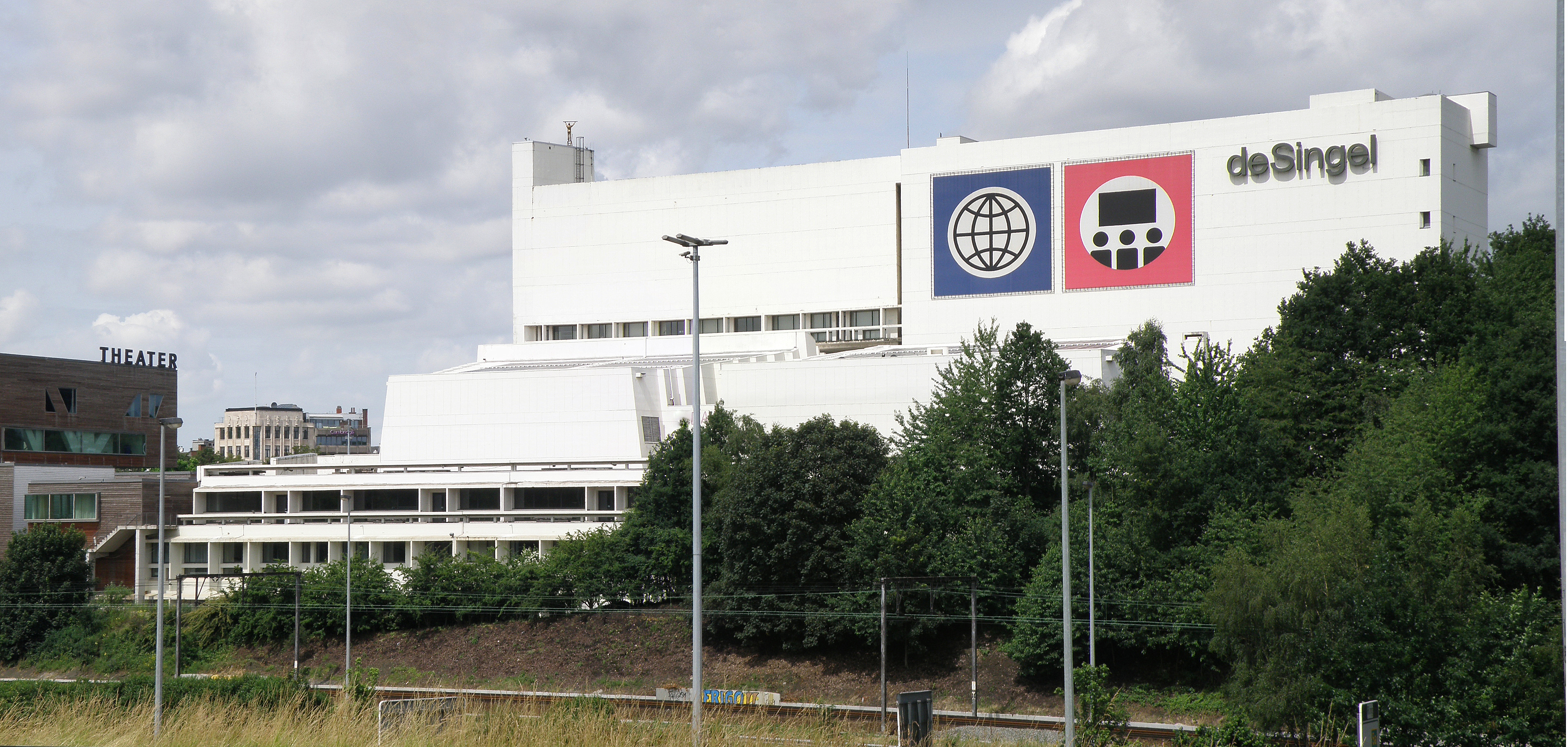 Antwerpen (België). Kunstencentrum DeSingel, aan de Singel (officieel: Desguinlei nr.25). Gebouwen van Léon Stynen i.s.m. Paul De Meyer (1963-88, wit gebouw rechts) en Stéphane Beel (uitbreiding uit 2007, houten gebouw links, slechts voor klein deel zichtbaar op foto). Tussen die twee gebouwen, meer op de achtergrond, Residentie Van Rijswijck, Art deco-appartementsgebouw op hoek Singel/Jan Van Rijswijcklei, door Léon Stynen uit 1932. Bemerk ook op dak van wit gebouw rechts, beeld "De man die de wolken meet" van Jan Fabre uit 1998.